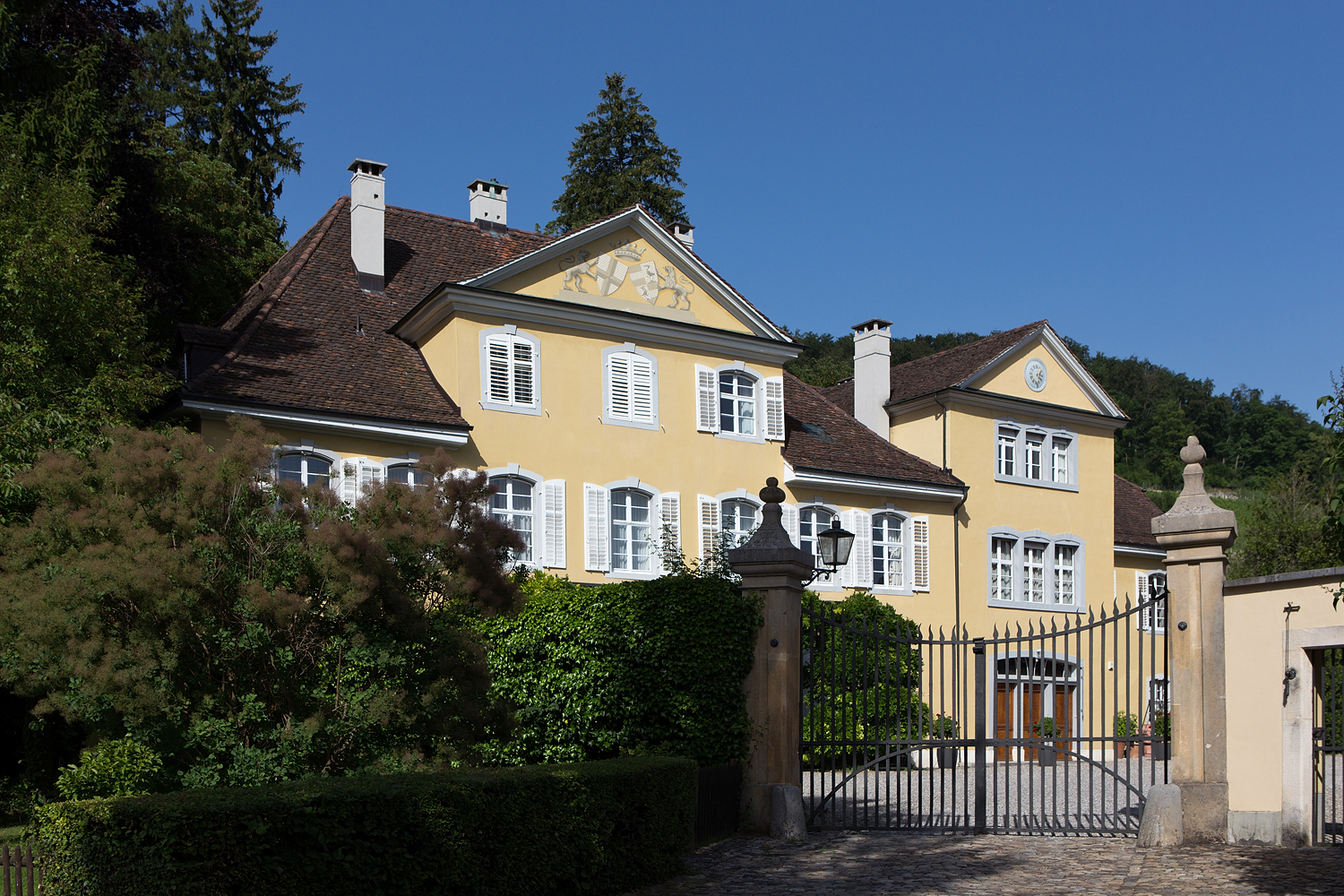 Andlauerhof in Arlesheim (Privatbesitz, nicht zugänglich)